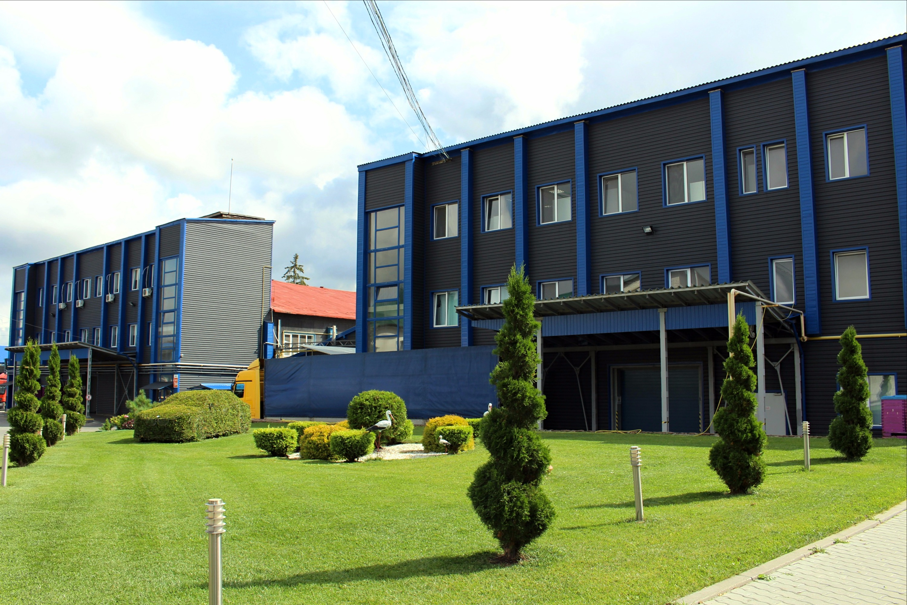 Дата фото - 2017 рік